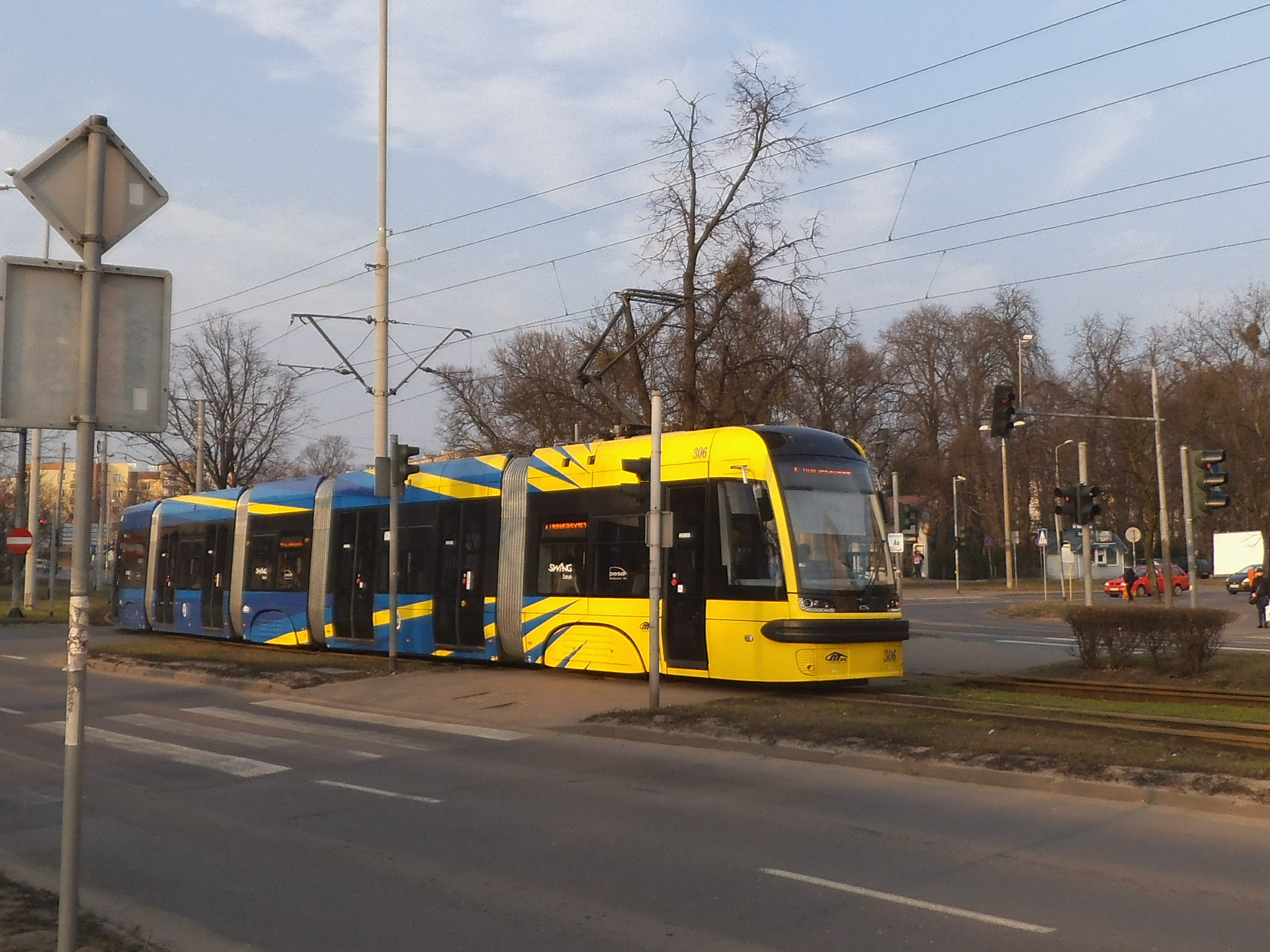 Pesa 122 NbT